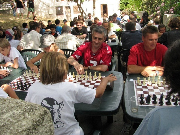 Tournoi de Casanova de Vencao.